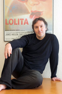 Carlos Zanón